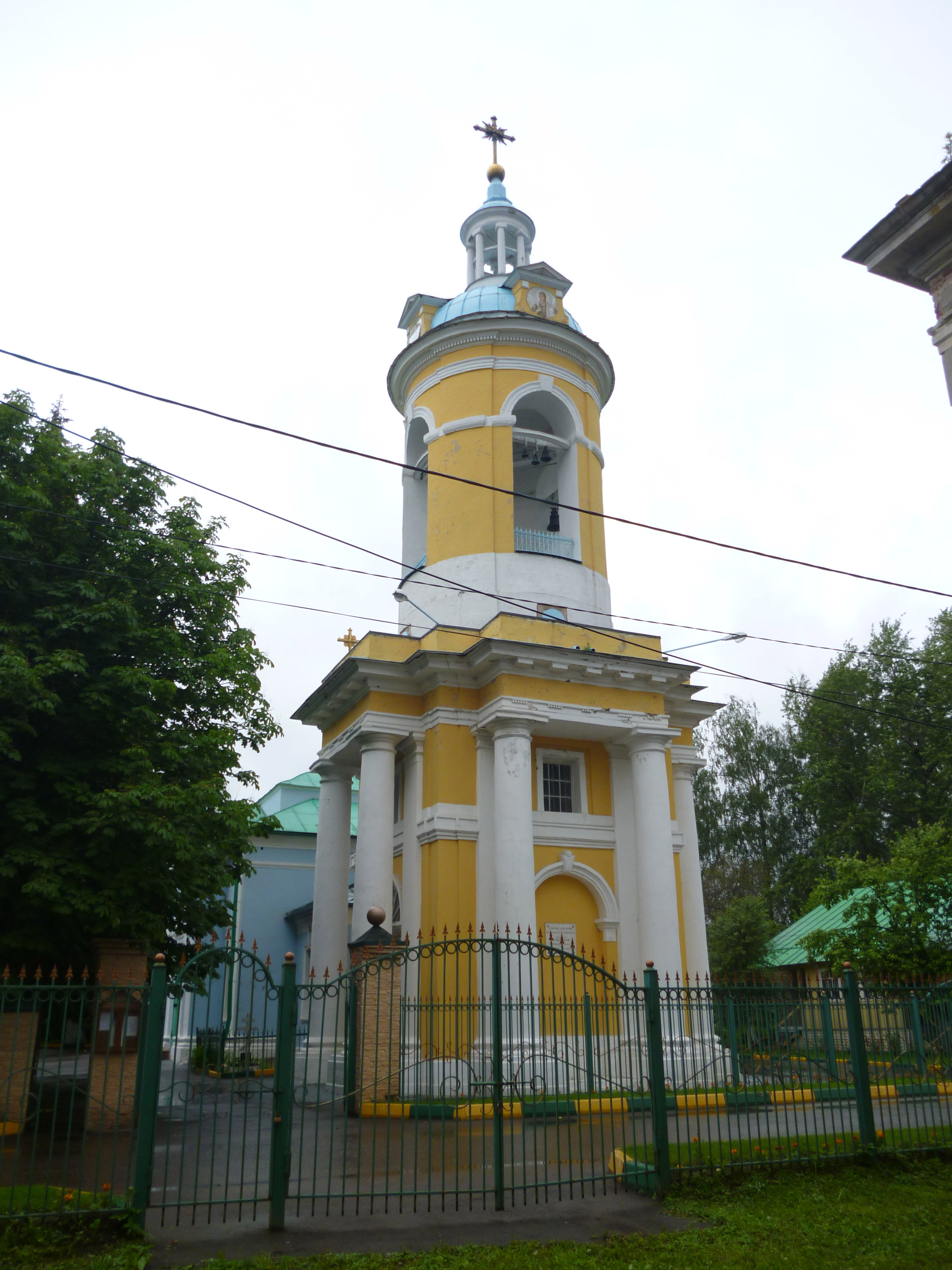 Церковь Покрова Пресвятой Богородицы в Петровском-Алабино